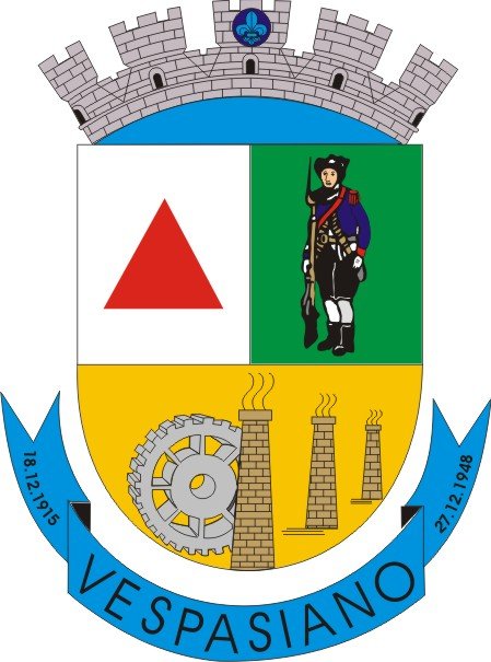 Brasão da cidade de Vespasiano-MG